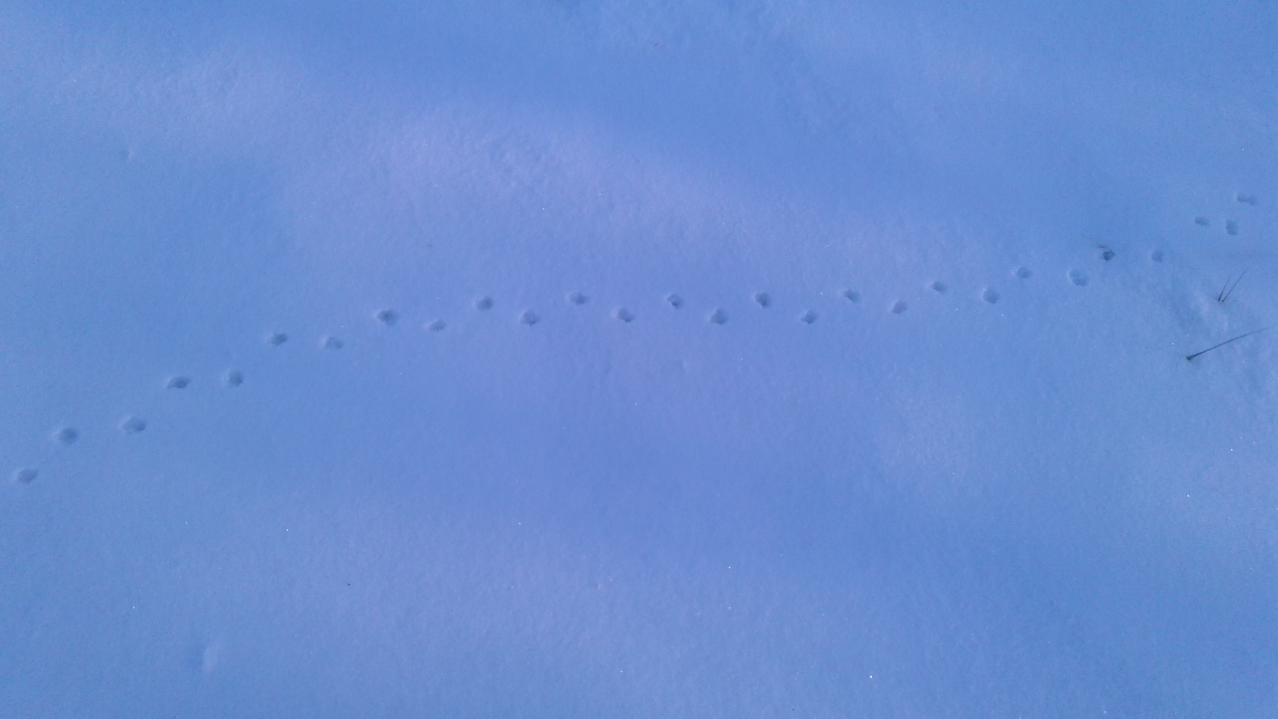 Знято у Матвіївському лісі